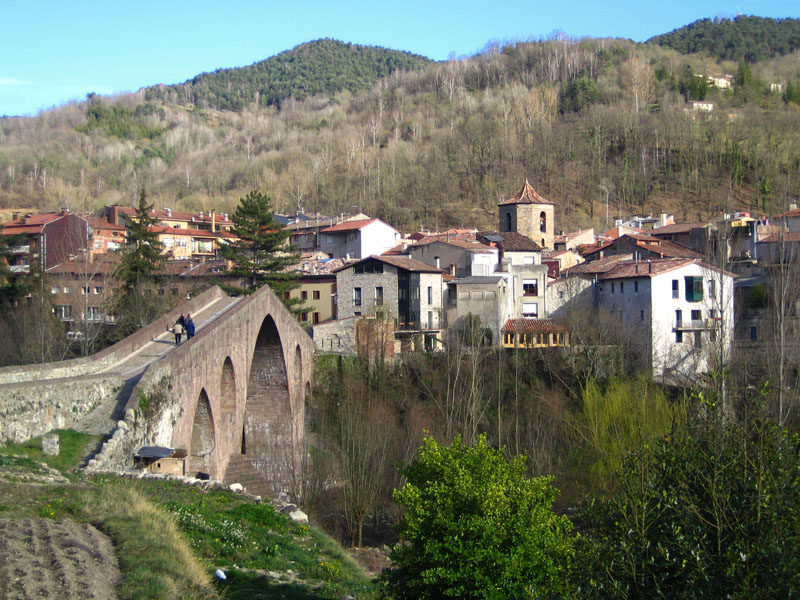 Sant Joan de les Abadesses, el Ripollès, Catalunya.